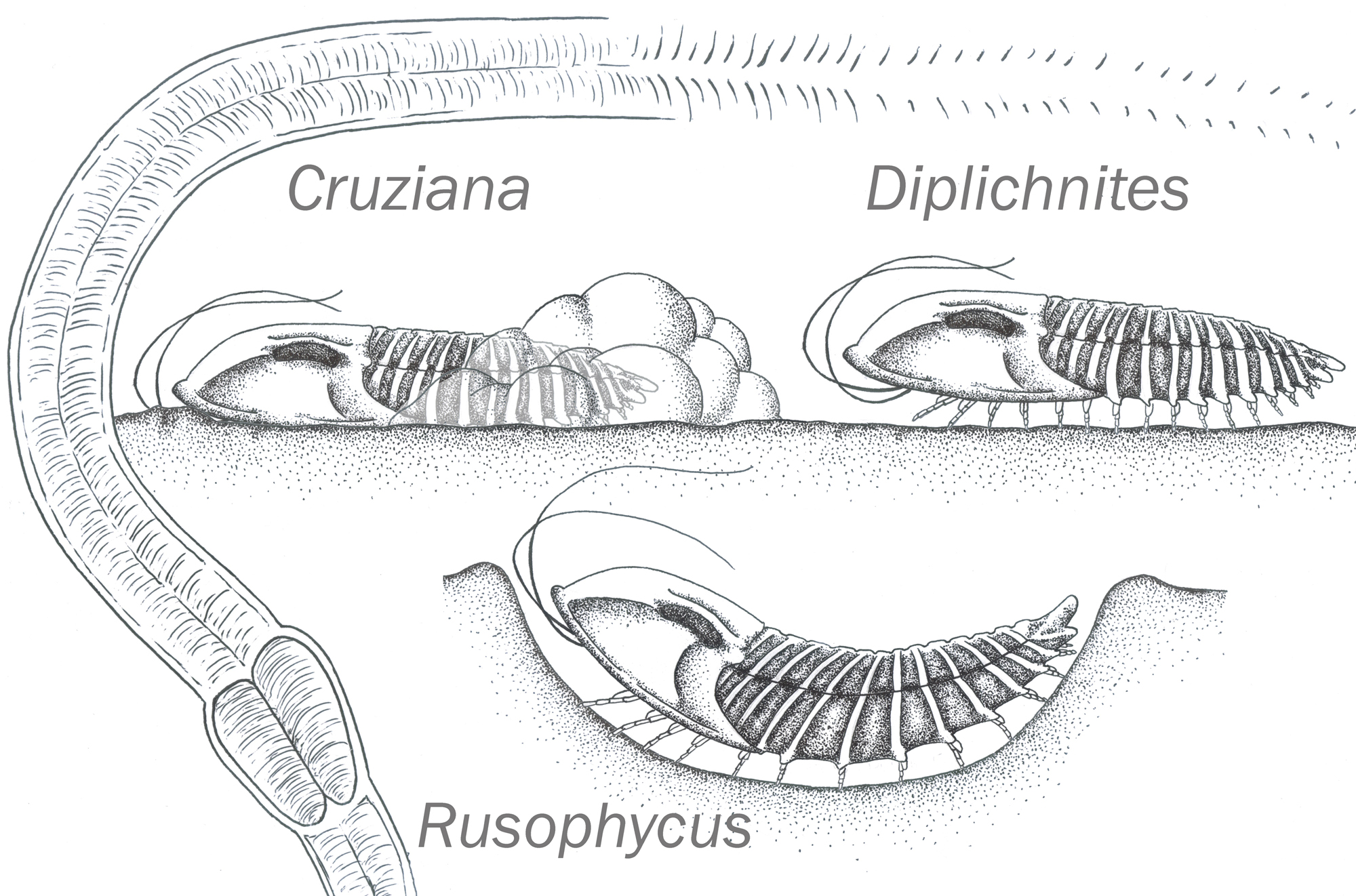 Imagen ilustrativa de cómo un único organismo puede formar varios icnofósiles. En este caso un trilobite forma Rusophycus al descansar semienterrado en el sustrato, Cruziana al desplazarse buscando alimento y Diplichnites al desplazarse sobre el fondo.